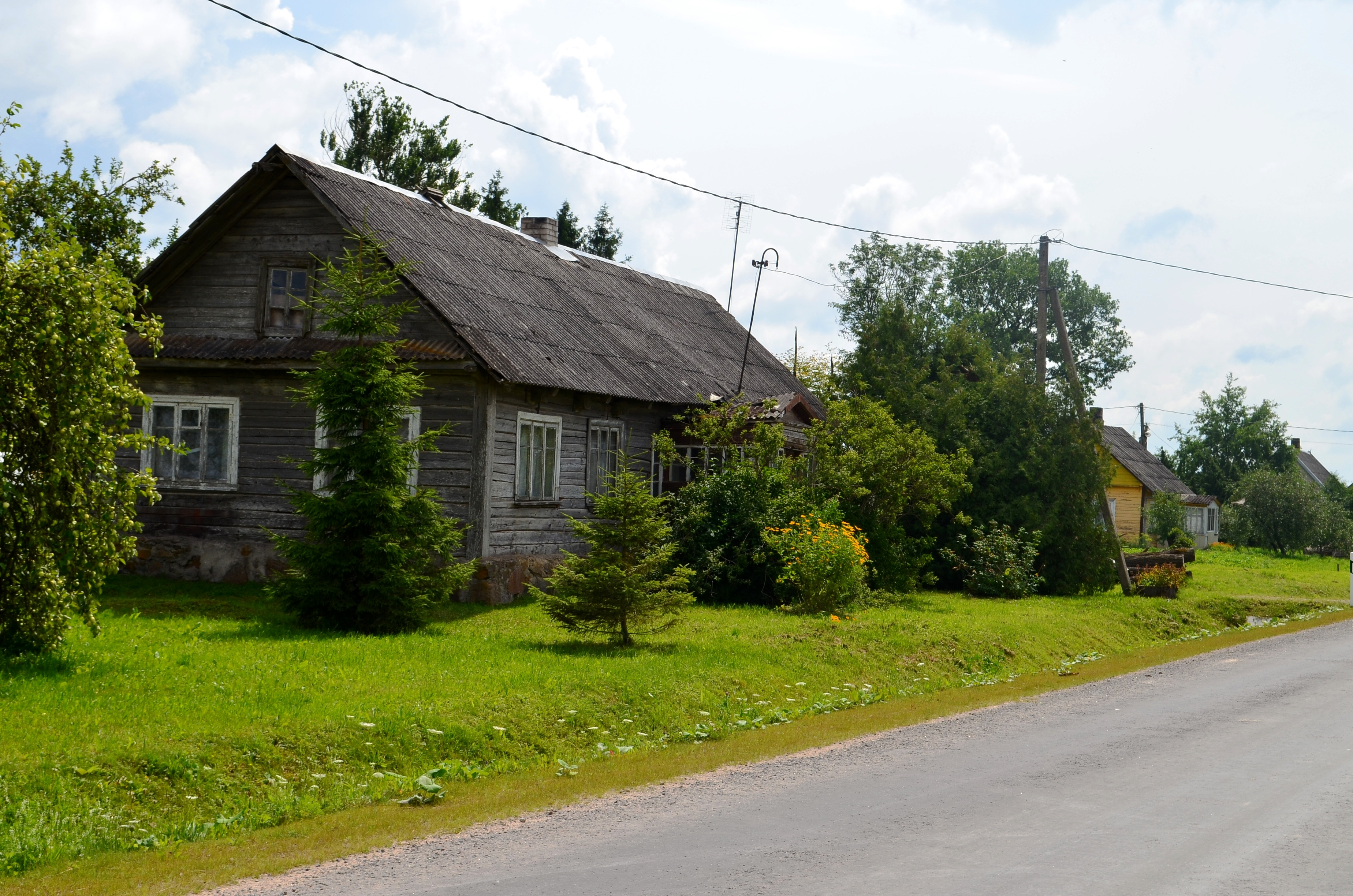 Stebėkių II k., Ramygalos sen., Panevėžio raj.